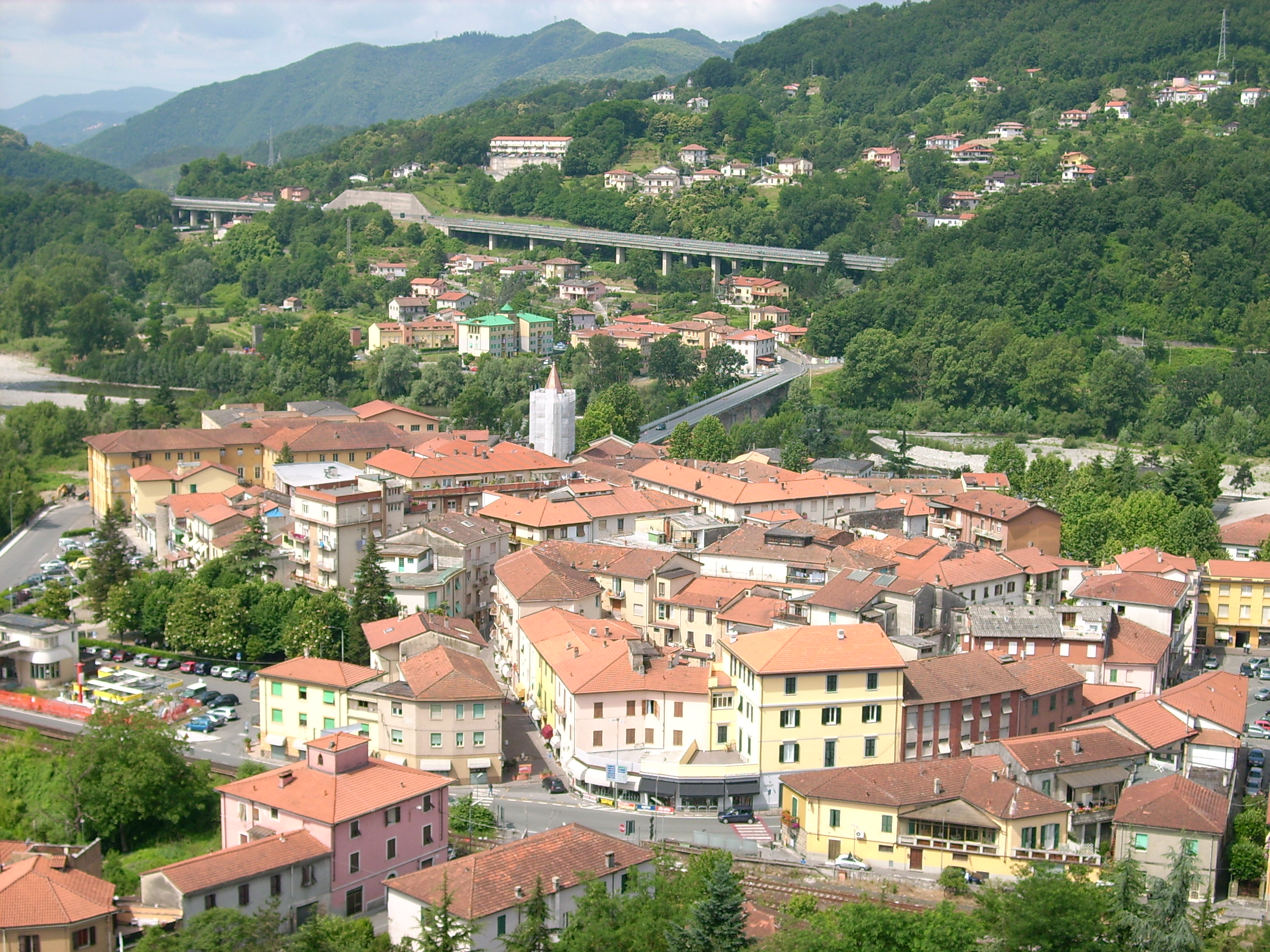 Panorama di Aulla, Toscana, Italia